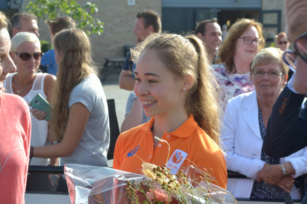 Huldiging van Eythora Thorsdottir